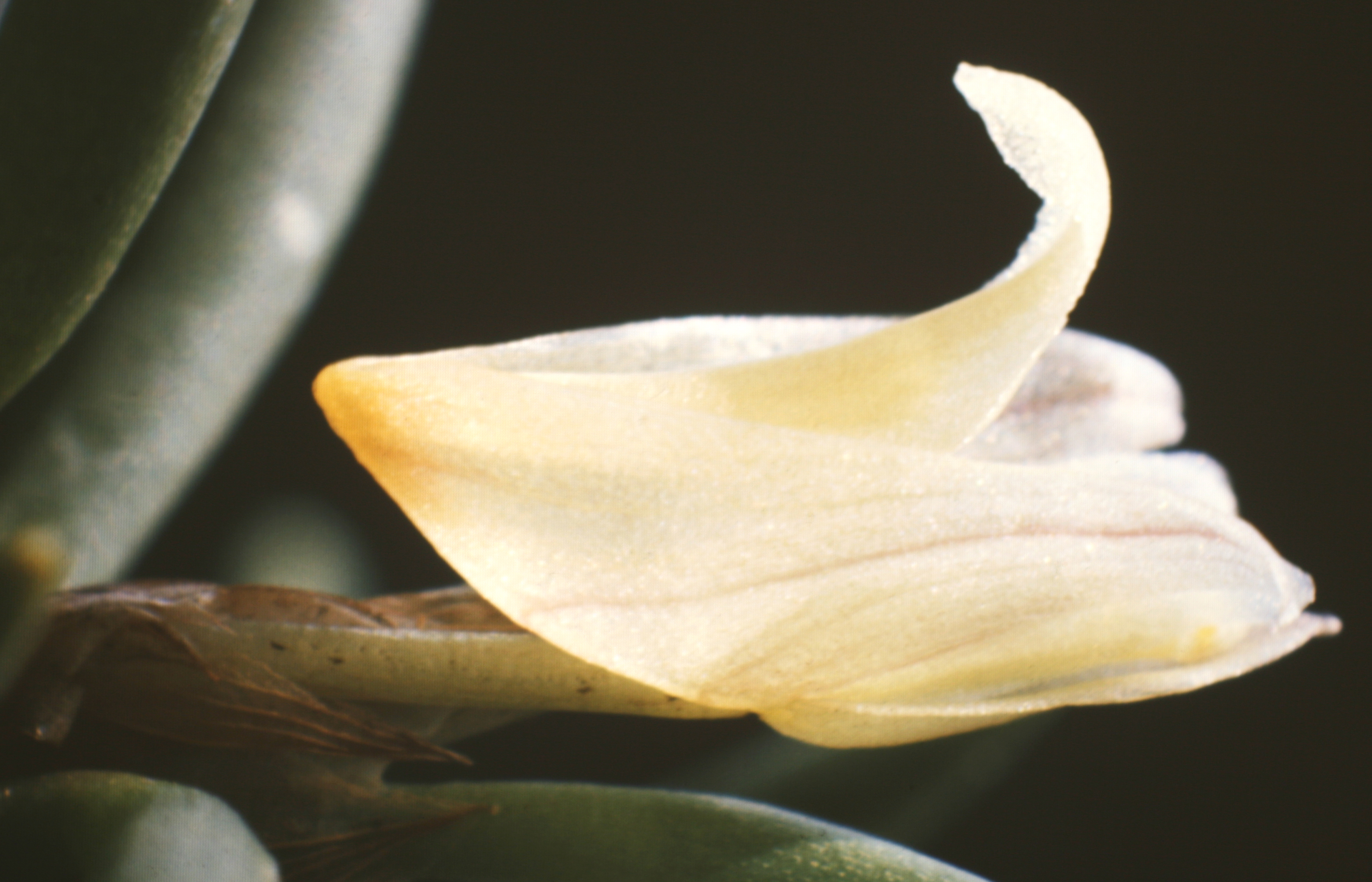 Maxillaria uncata, Suriname.